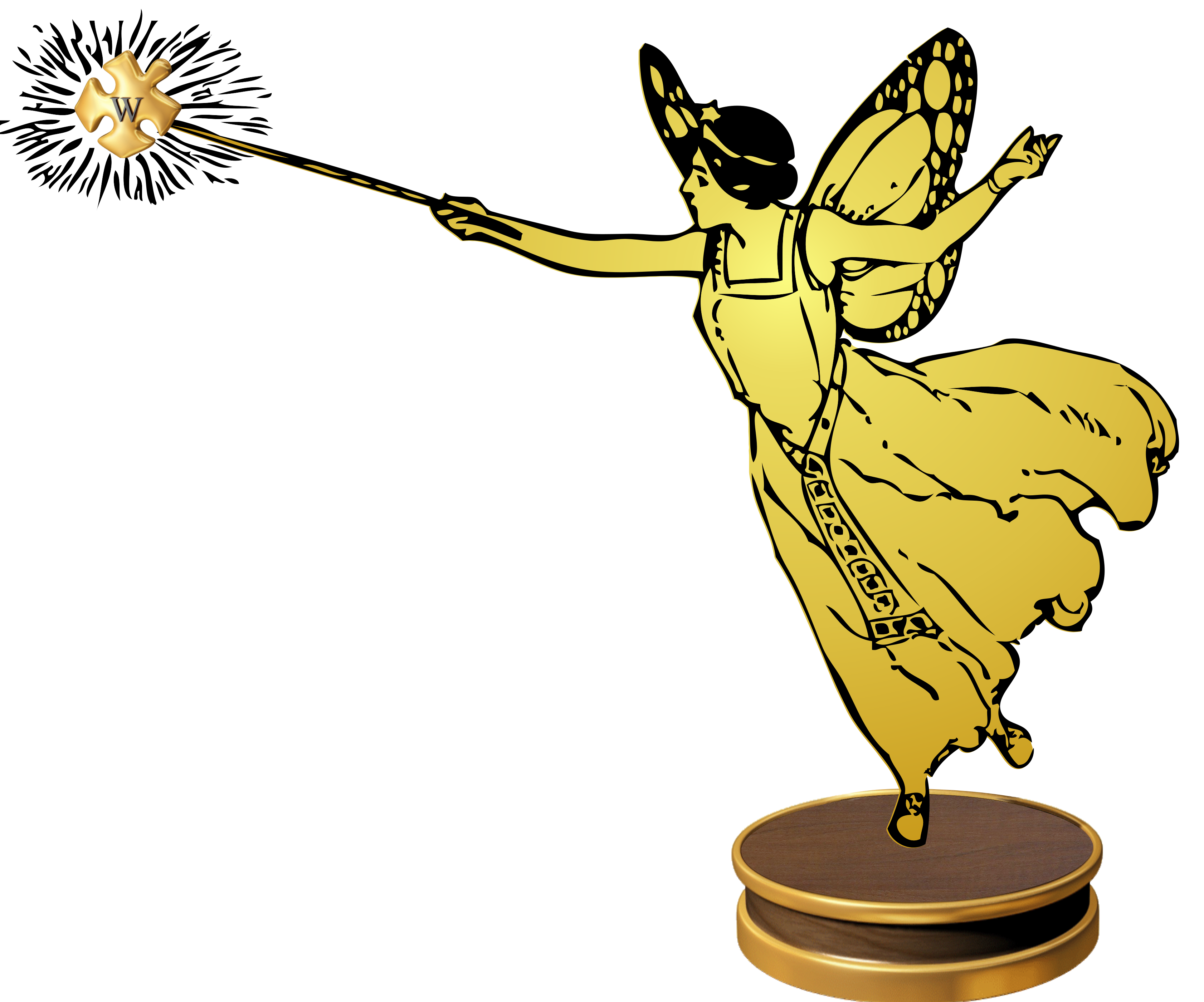 Preis für Benutzer:Drahreg01/Drei Wünsche frei